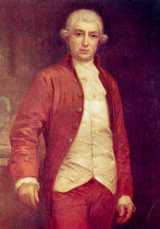 Antoni de Gimbernat